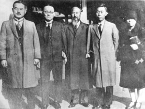 1925년 도쿄에서 열린 제3회 범태평양회의에 한민족 대표로 참가한 백관수, 송진우 전 동아일보 사장, 윤치호, 유억겸 순